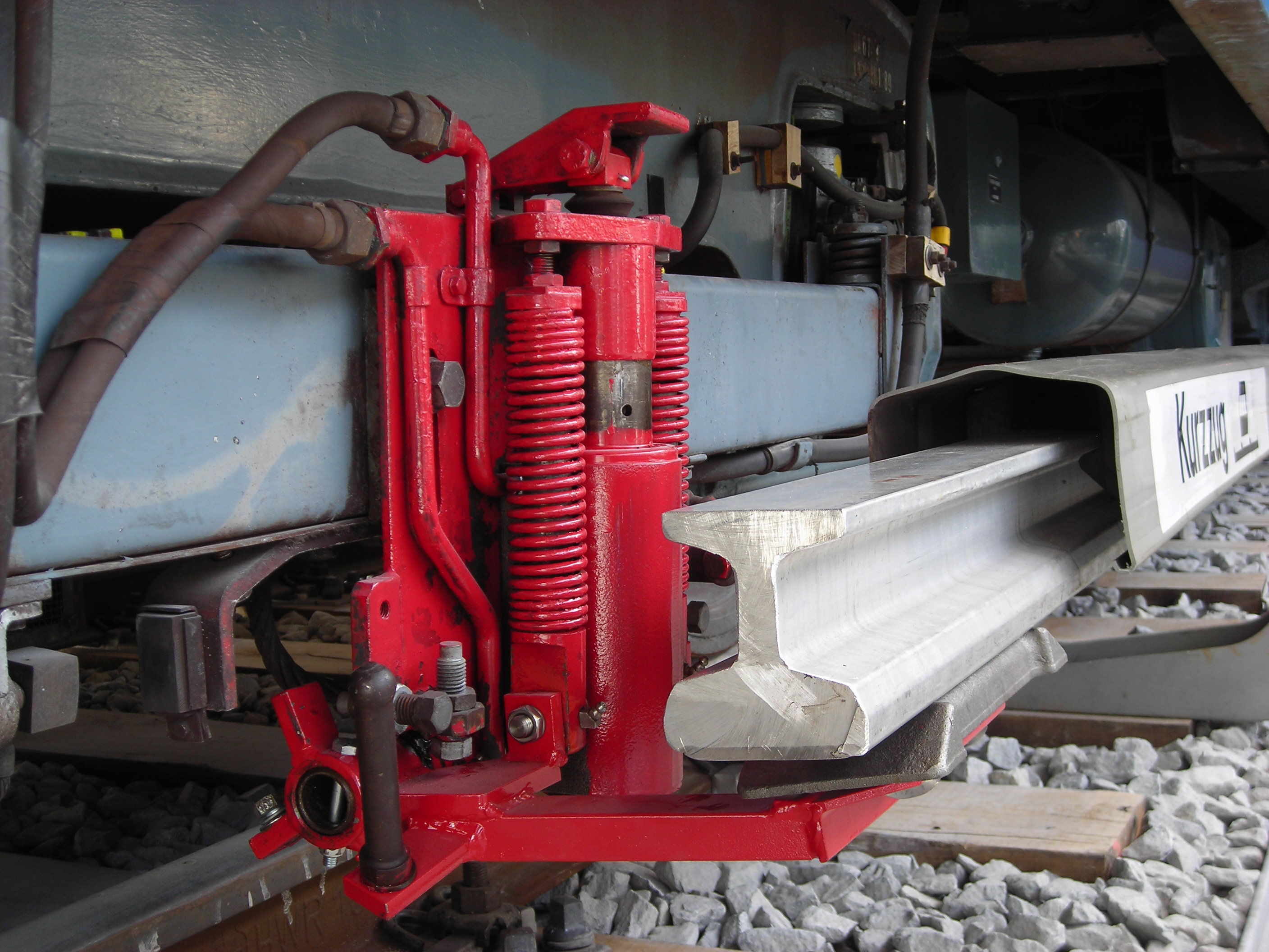 Stromabnehmer der U-Bahn München, Typ 6092. Exponat im Deutschen Museum Verkehrszentrum, Halle III.